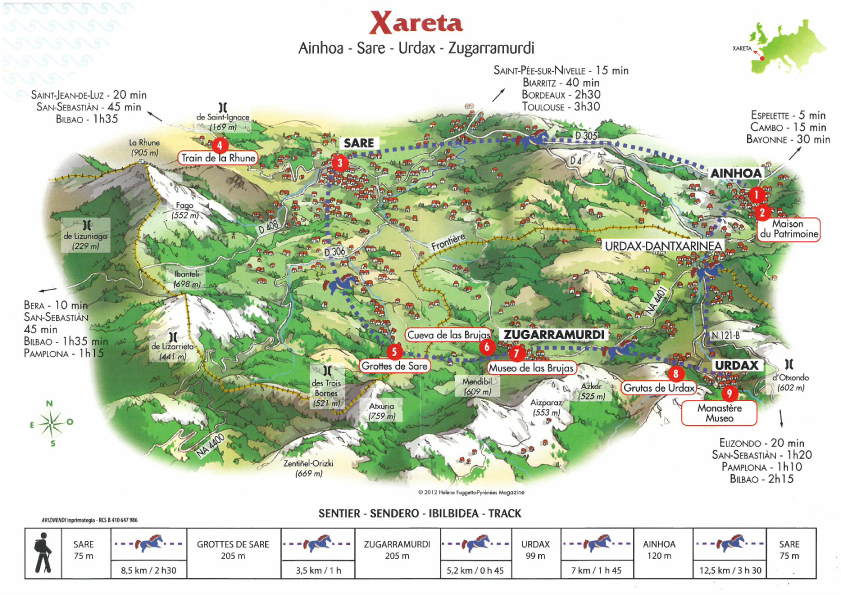 Pottoka Urdina ibilbide osoa egin ahal izateko bidelagun izateko mapa.